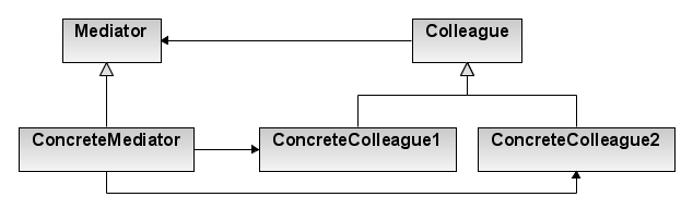 The Mediator design pattern UML diagram